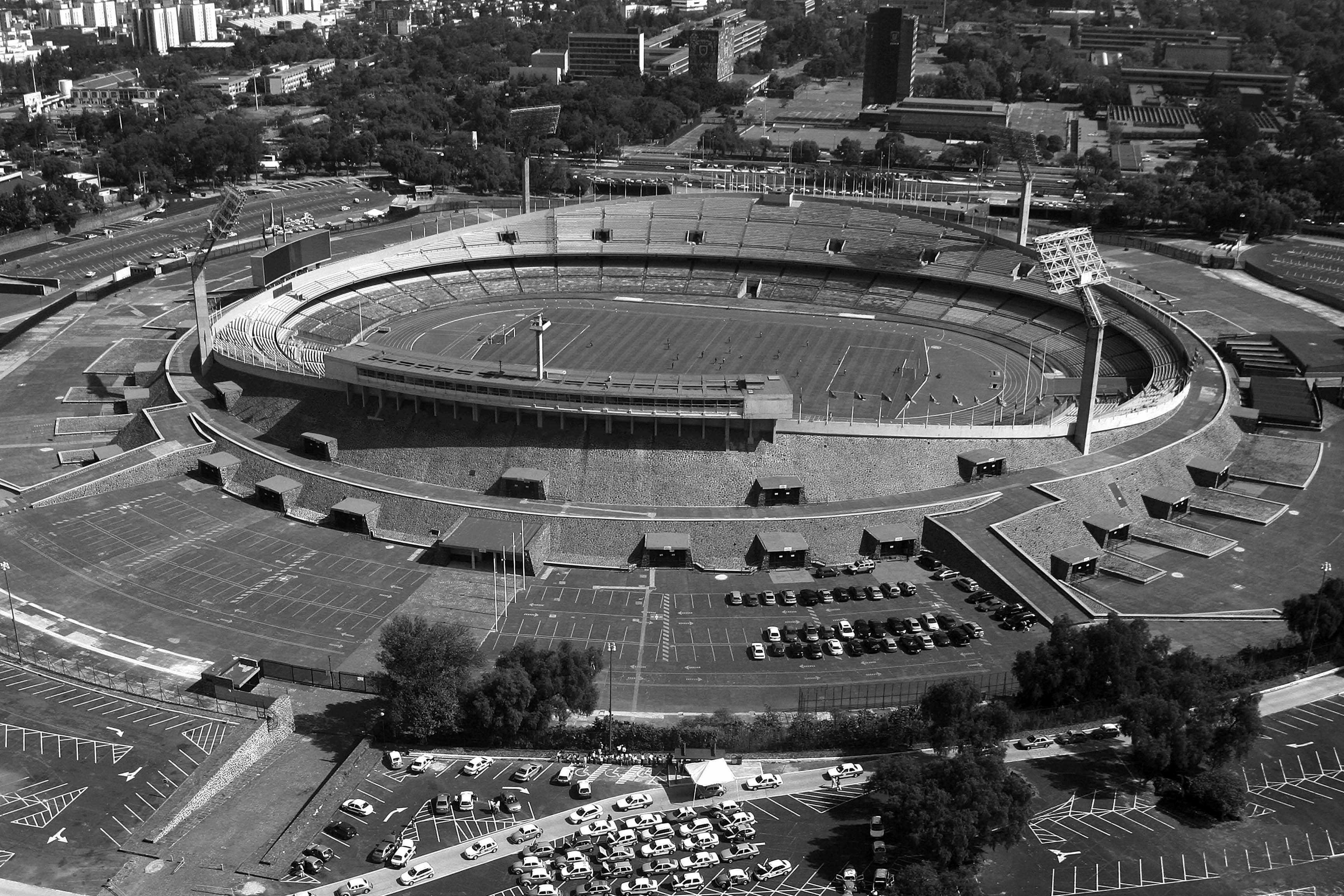 Estadio Olimpico Universitario. Mexico 68